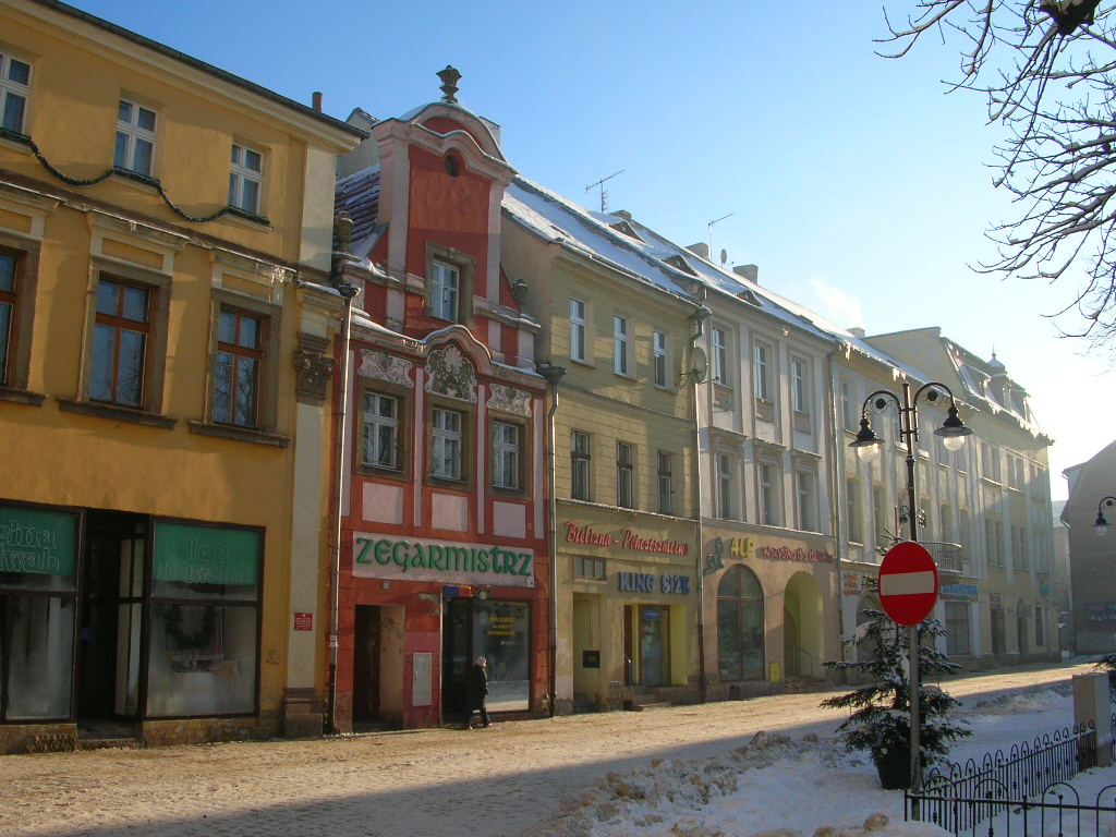 Kamienna Góra - Plac Wolności Autor - Bartek Wawraszko